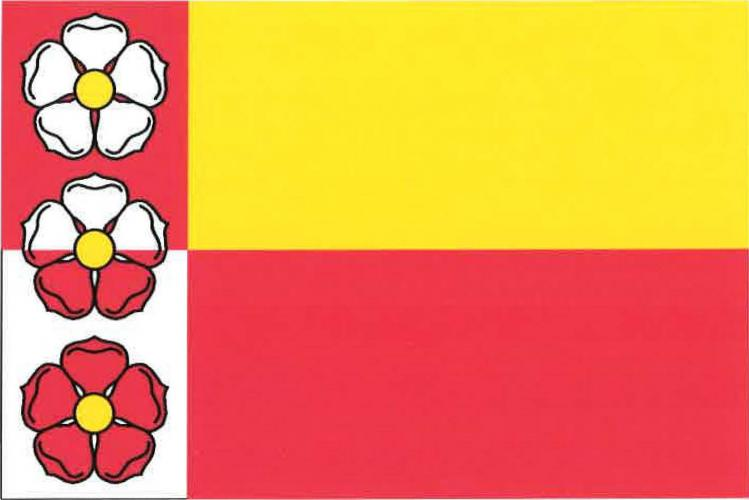 vlajka, Semněvice, okres Domažlice